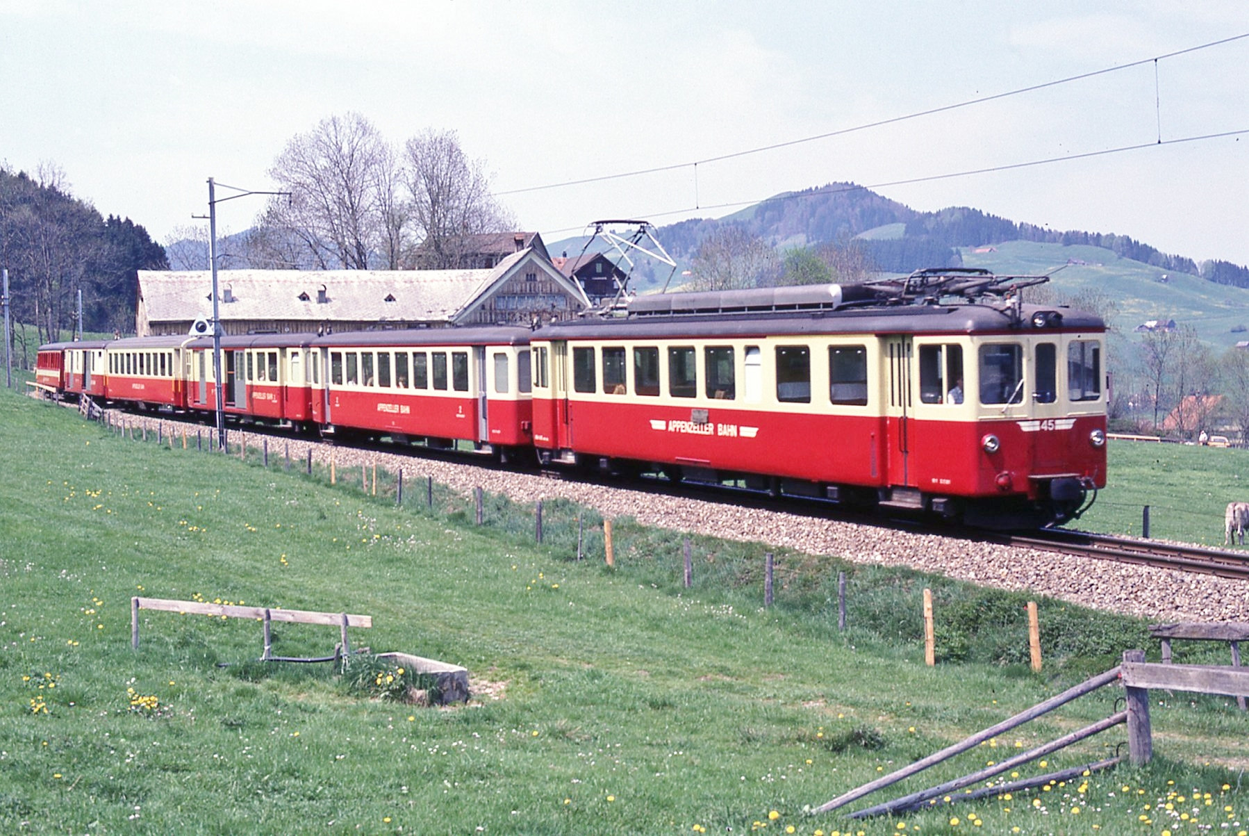 AB ABe 4/4 45 mit B 8 oder 9 und BDZt 60 als Pendelzug, verstärkt mit einem B EW I 22-27, DZt 65 und Br 10 nähert sich von Gonten her Appenzell.